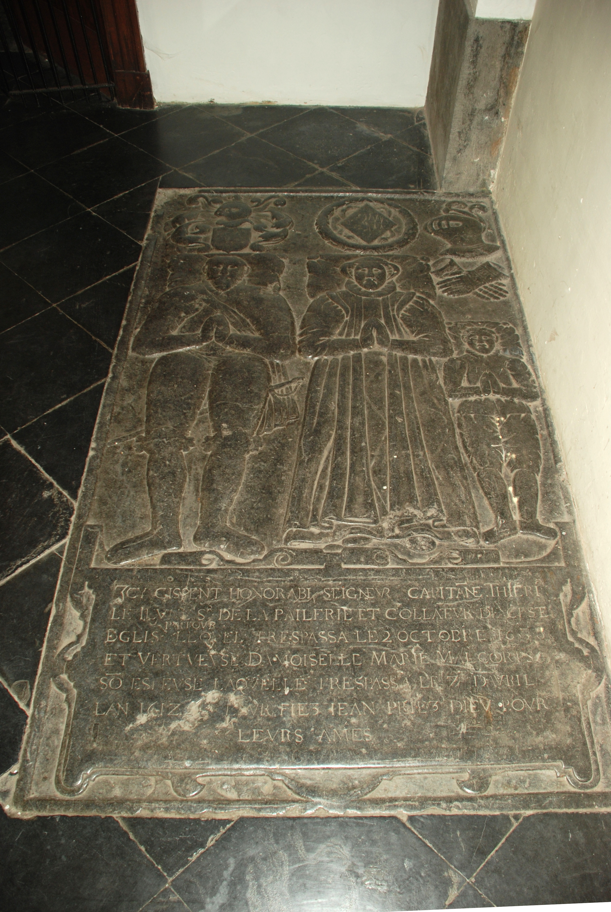 Belgique - Église Saint-Barthélémy de Bousval